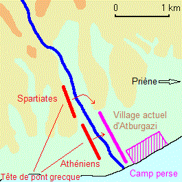 Carte de la bataille du cap Mycale. Les perses en fuite ont eu la possibilité de suivre la rivière jusqu'aux montagnes.